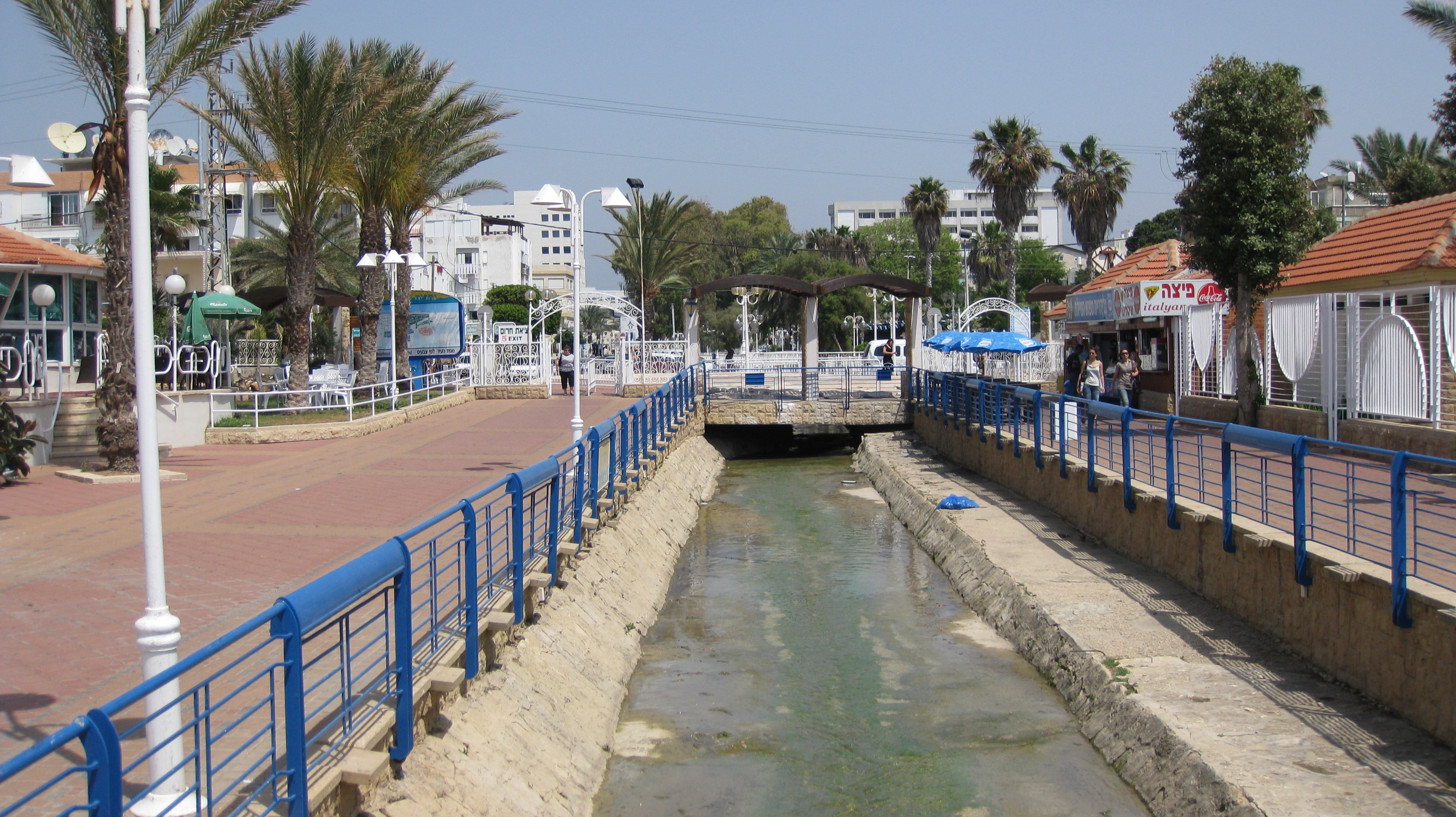 Nahariyya - Gaaton River, near the Nahariyya beach נהריה שפך נהר הגעתון אל הים